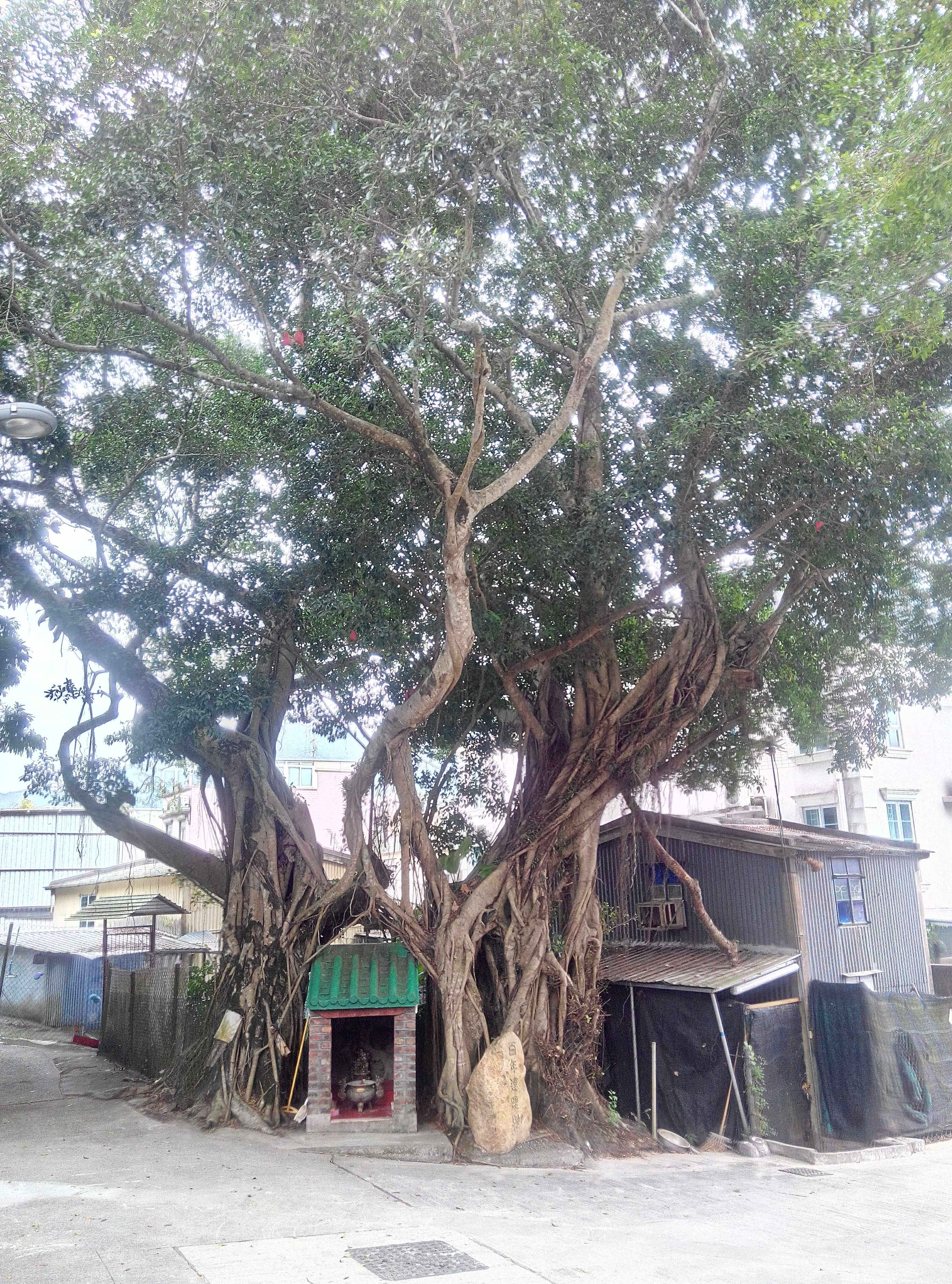 中文（香港）: 大埔泰亨鄉百年連理樹